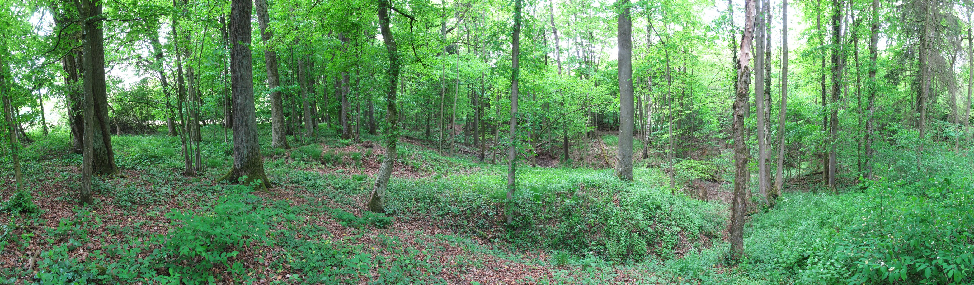 Oberrimbacher Erdfälle (Naturschutzgebiet 1.139, Main-Tauber-Kreis, Baden-Württemberg), Details